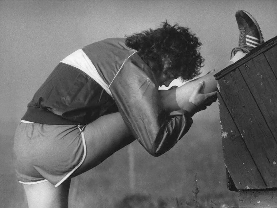 1987 PRESS PHOTO ANGELA ZUCKERMAN MILWAUKEE SPEED SKATER STRETCHING OUT